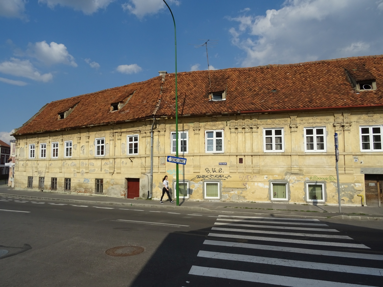 Casă veche